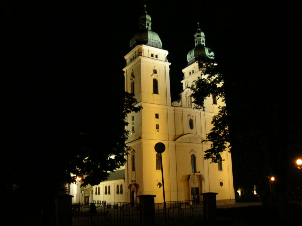 Piła - Kościół św Rodziny nocą Autor - Bartek Wawraszko